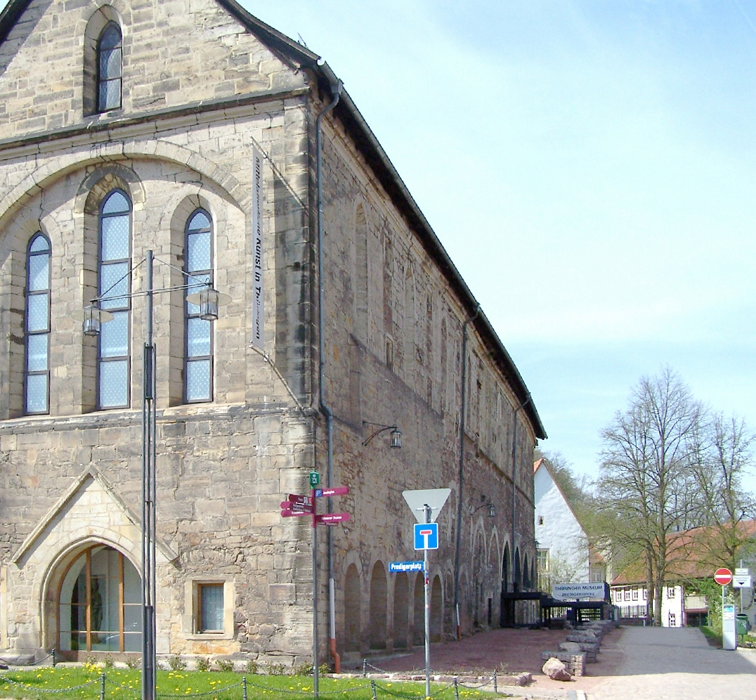 Predigerkloster in Eisenach